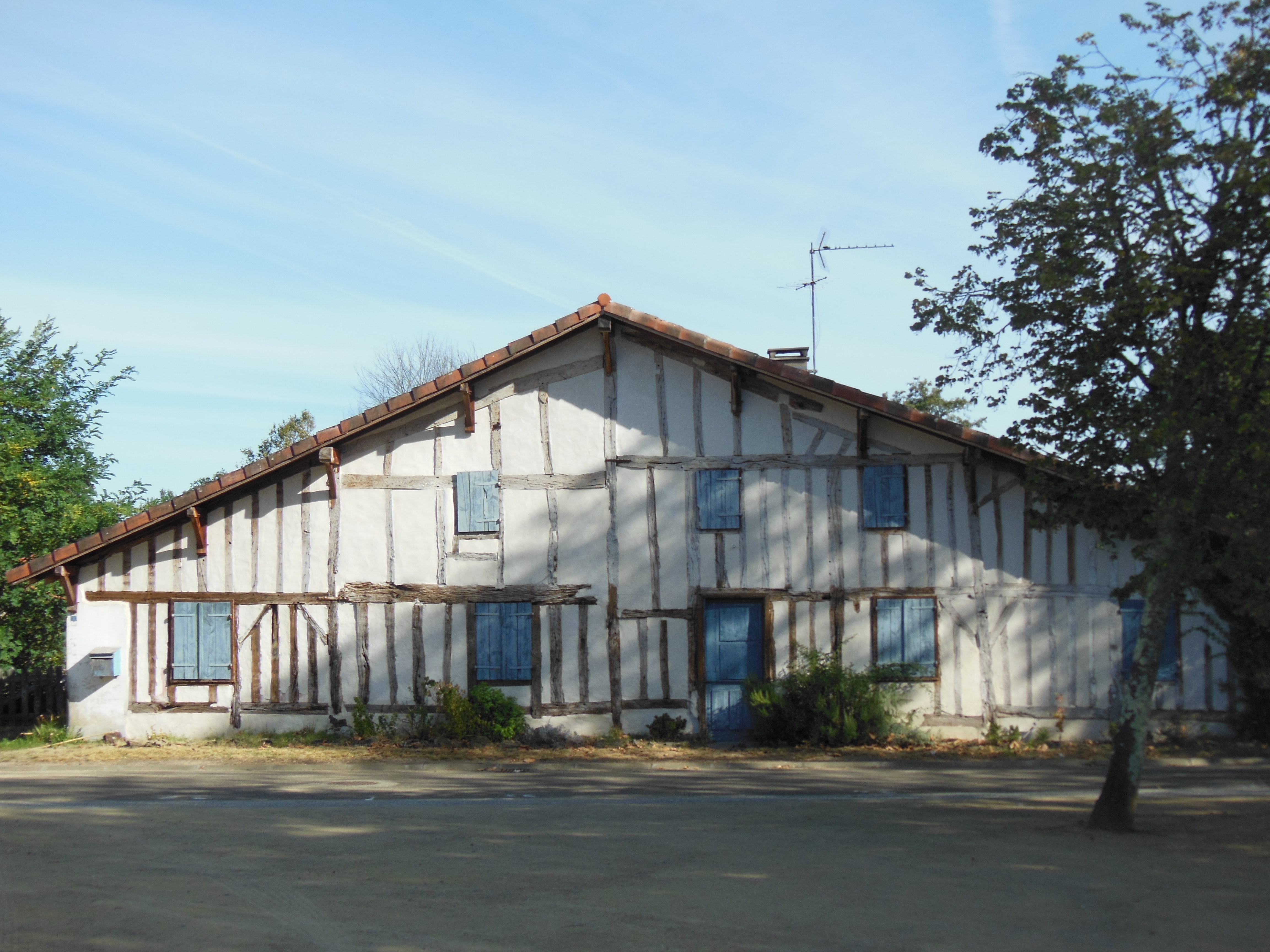 Maison landaise à Morcenx-bourg, dans le département français des Landes